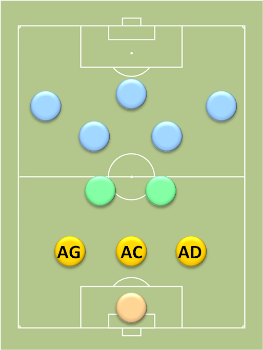 Positions_au_football_des_défenseurs_dans_un_2-3-5_(schéma_classique)